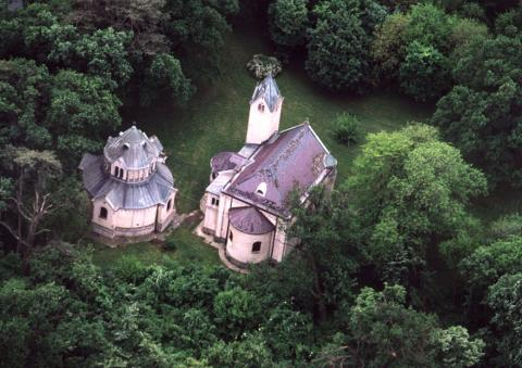 Doboz, Hungary, aerial photography, Szent Kereszt felmagasztalása római katolikus templom